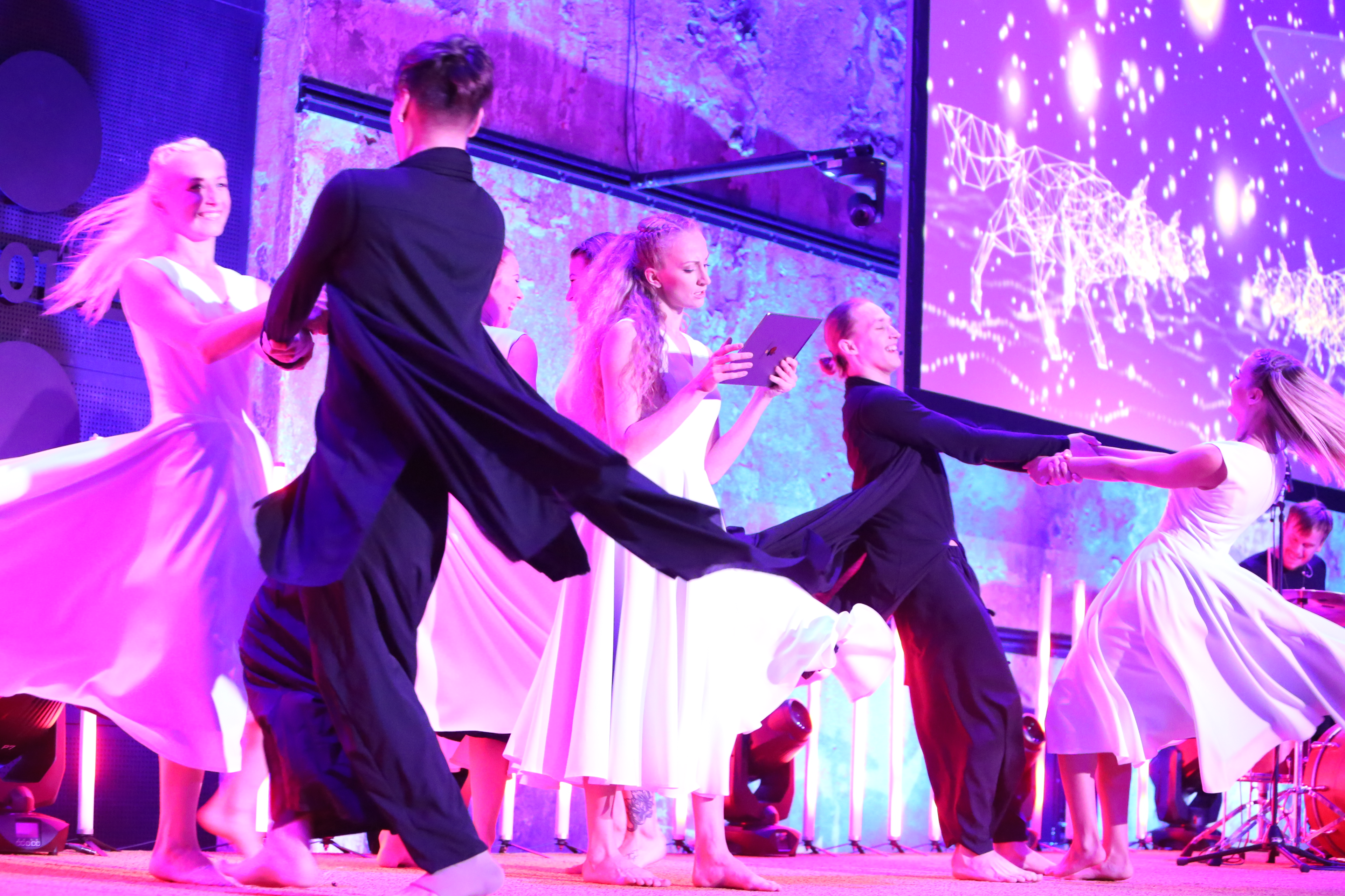 Photo: Annika Haas (EU2017EE)